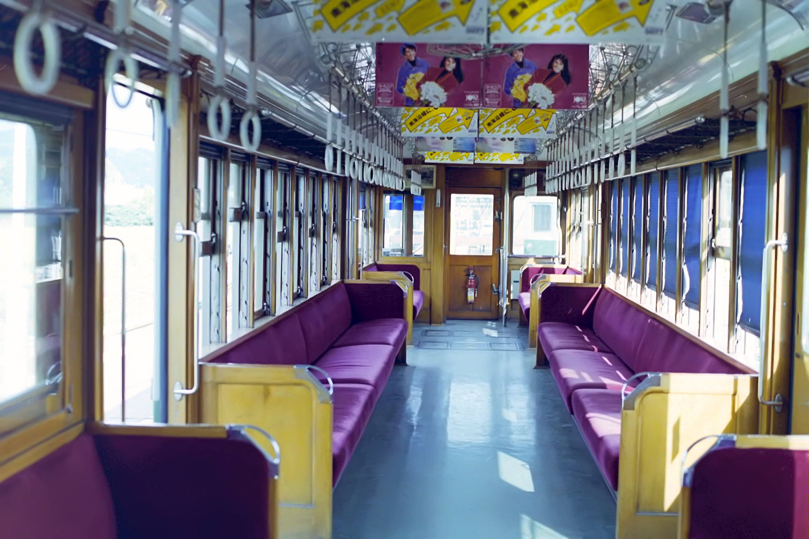 南海1201形車内